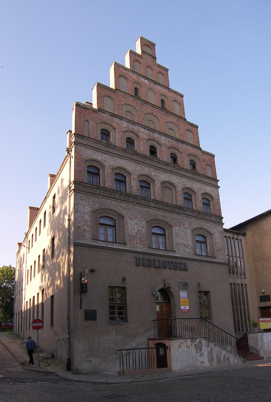 Stargard Szczeciński - Dom Rohledera.